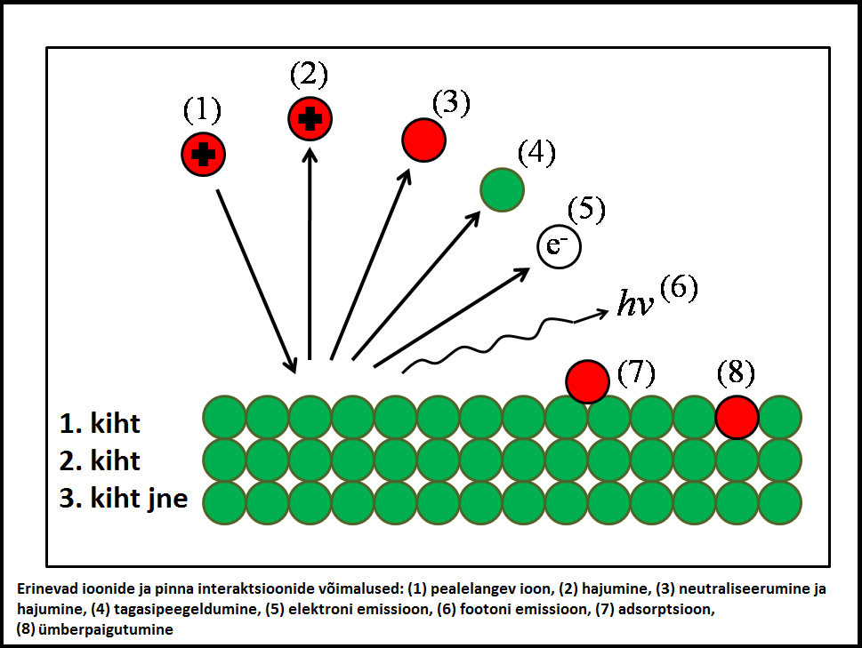 Langeva ioonkiire ja pinna vahelised interaktsioonid